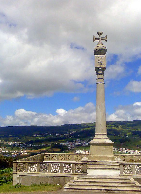 Monte Brasil Padrao - Azores Terceira